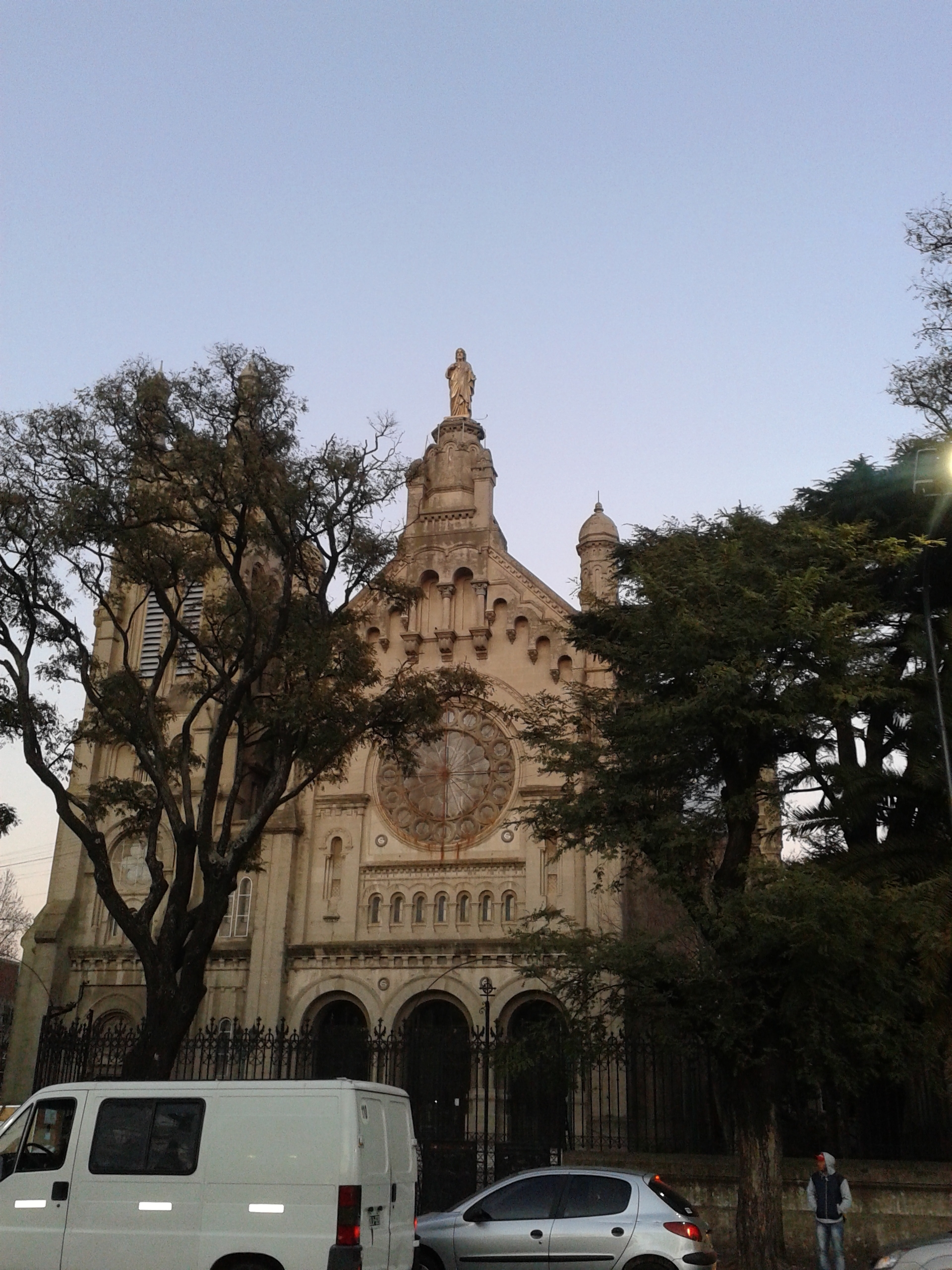 Iglesia del Sagrado Corazón de Jesús. Está ubicada en Barracas, en la Av. Velez Sarsfield y California. La basílica católica fue construida el 16 de Agosto de 1908 por Don Leonardo Pereyra Iraola.